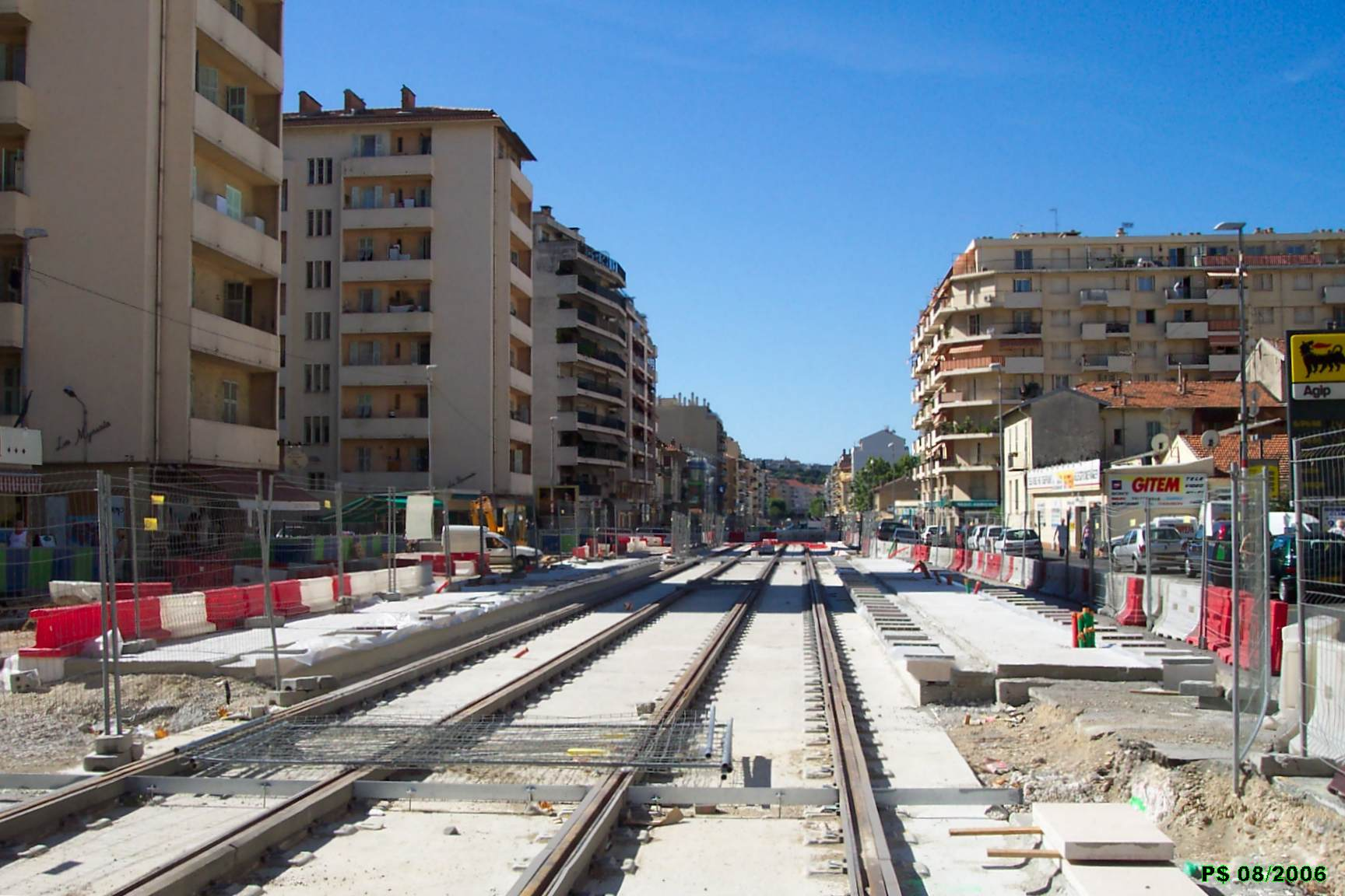 Nice - Quartiers de Nice Nice - Quartier Saint Roch Le Bd Saint Roch, et les futurs rails du tramway de la (future) ligne n°1.